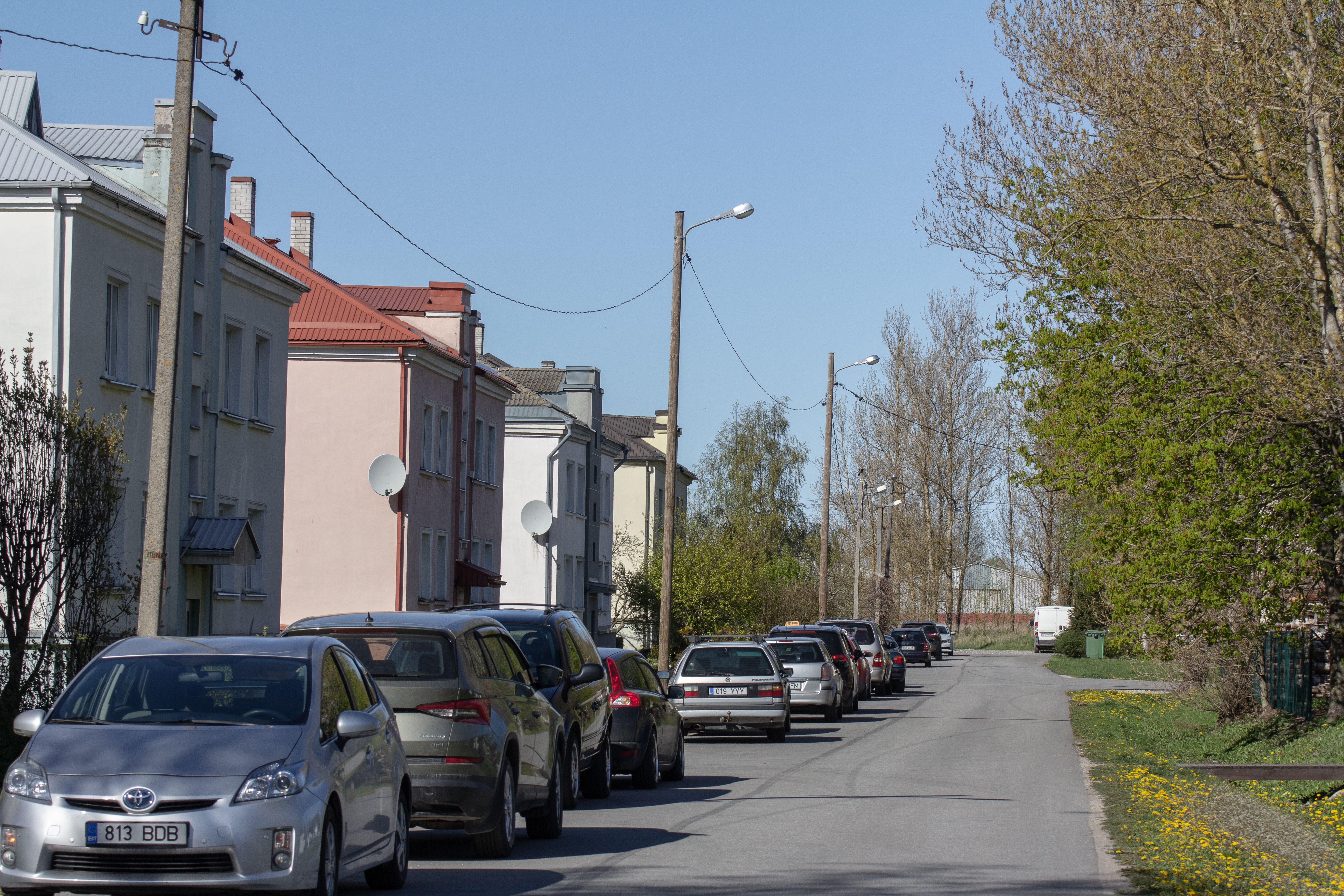 Laevastiku tänav, Tallinn, 09.05.2020